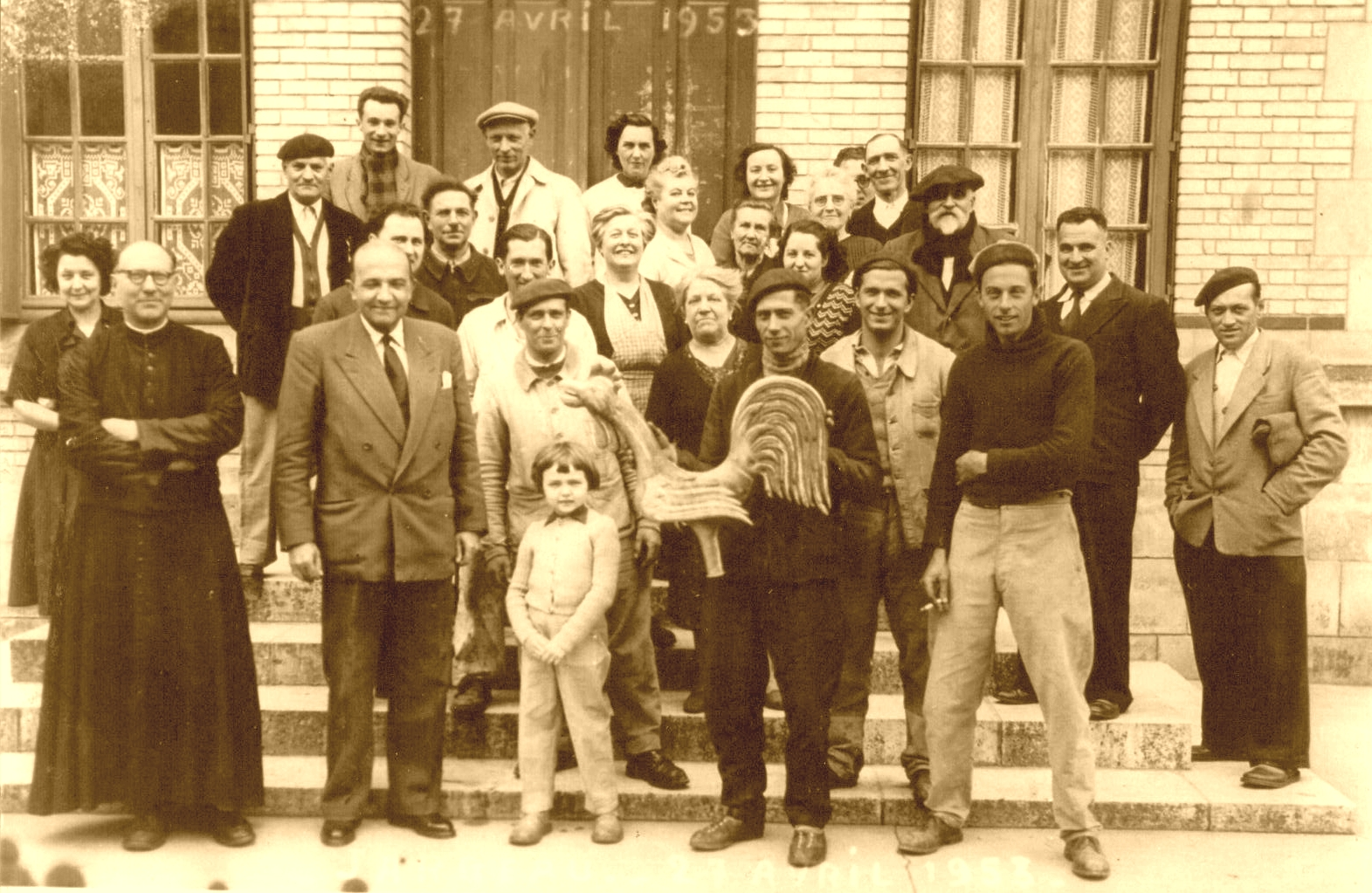 Quelques notables gergoliens, dont le notaire, alors maire de Jargeau, Jacques Piédon, en costume au 1er rang, et le curé Legrain, à gauche au 1er rang, posant avec le coq servant de girouette sur le clocher de l'église Saint-Êtienne.